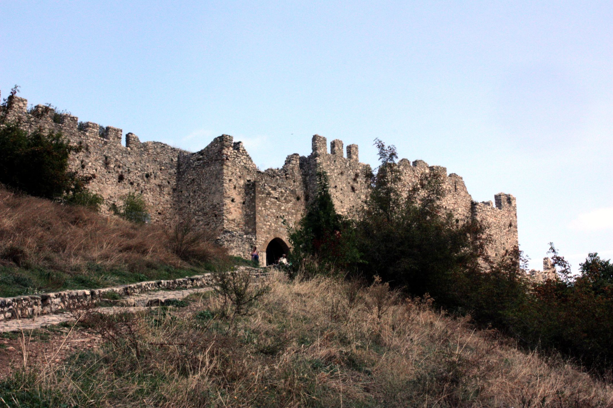 Der Eingang der Burg von Platamon